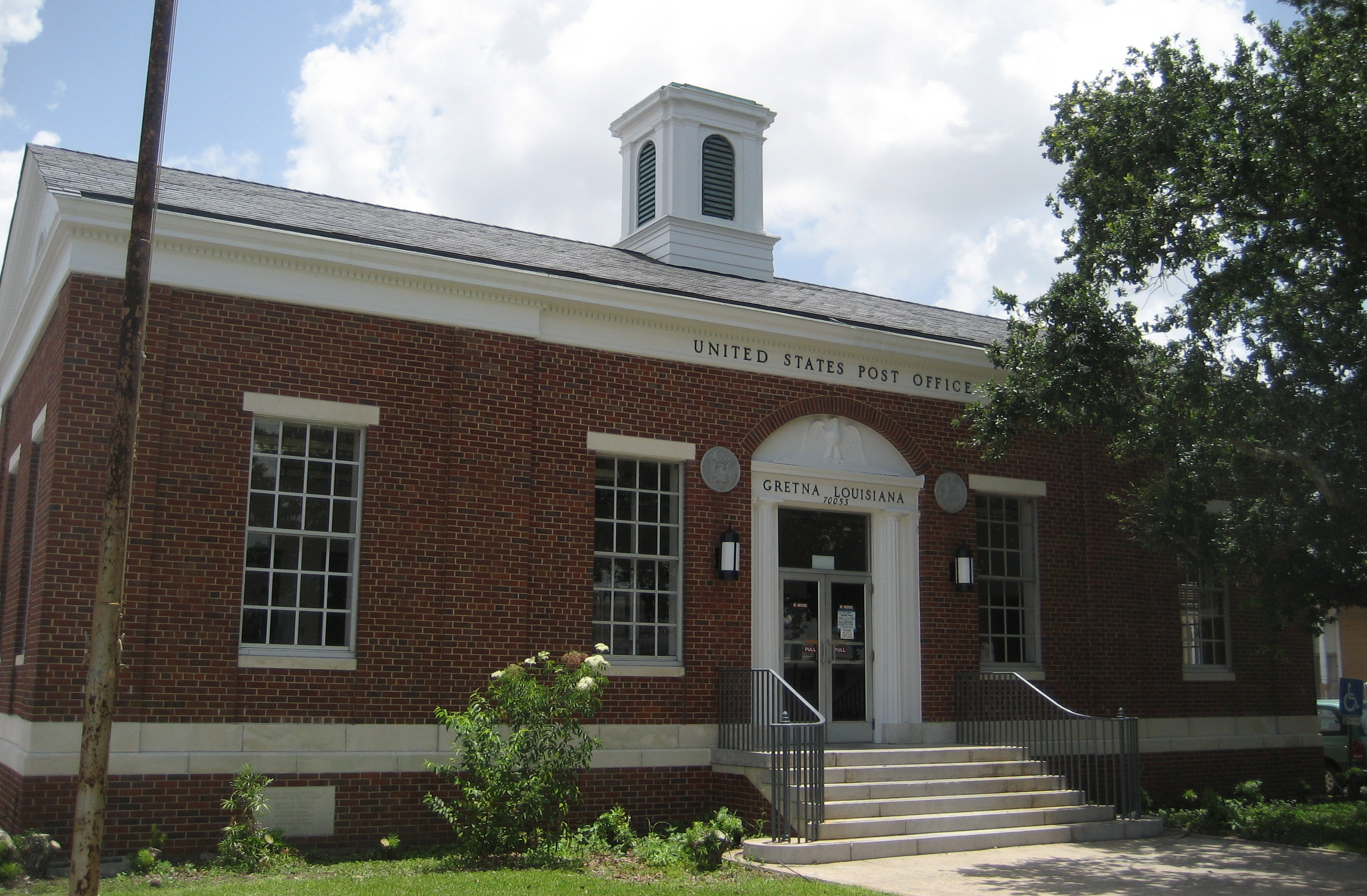 Gretna, Louisiana. Post Office.